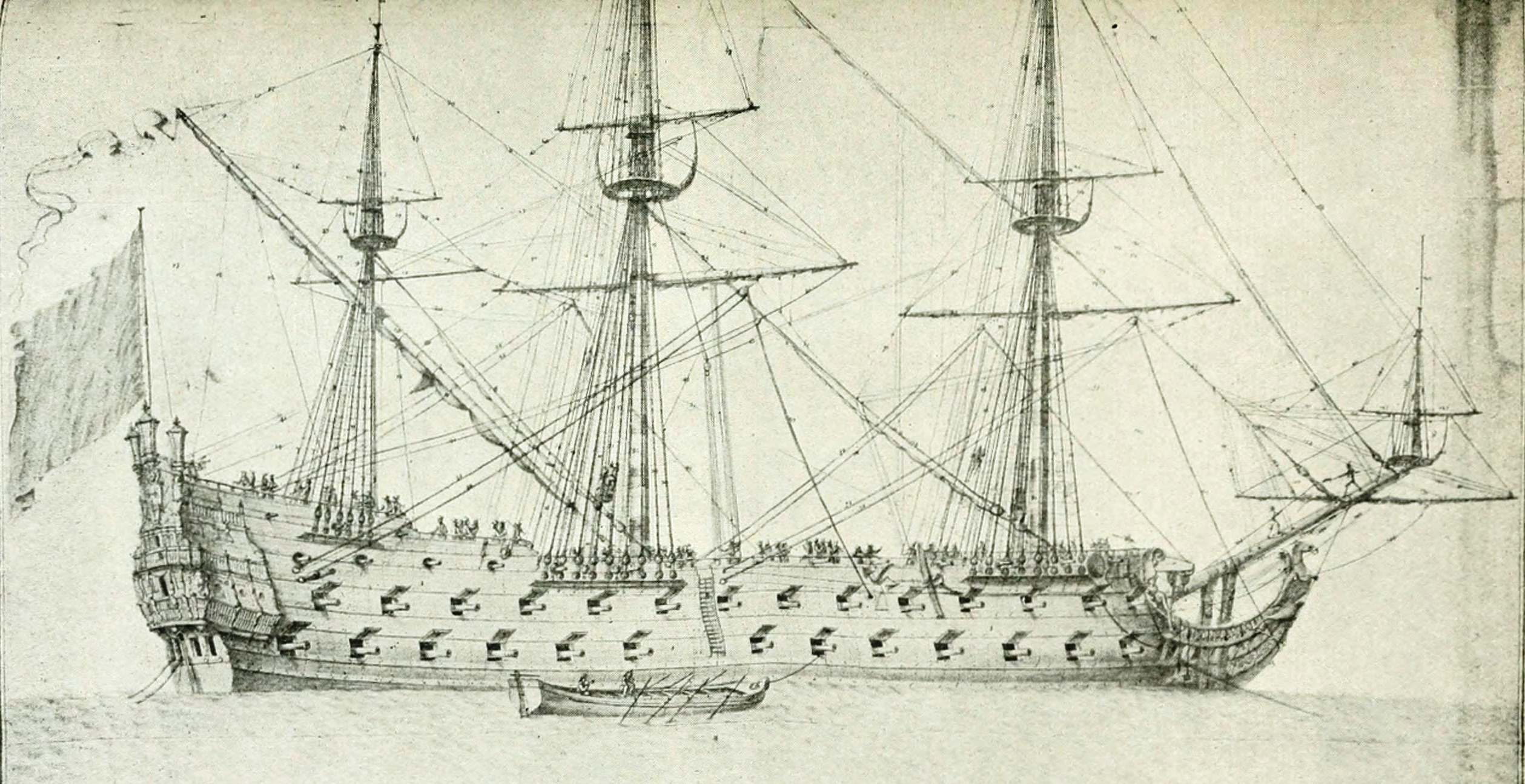 Vaisseau de ligne de Louis XIV sans nom. Armement approximatif : 70 canons. Bâtiment construit par Blaise Pangalo, dit Maître Blaise.